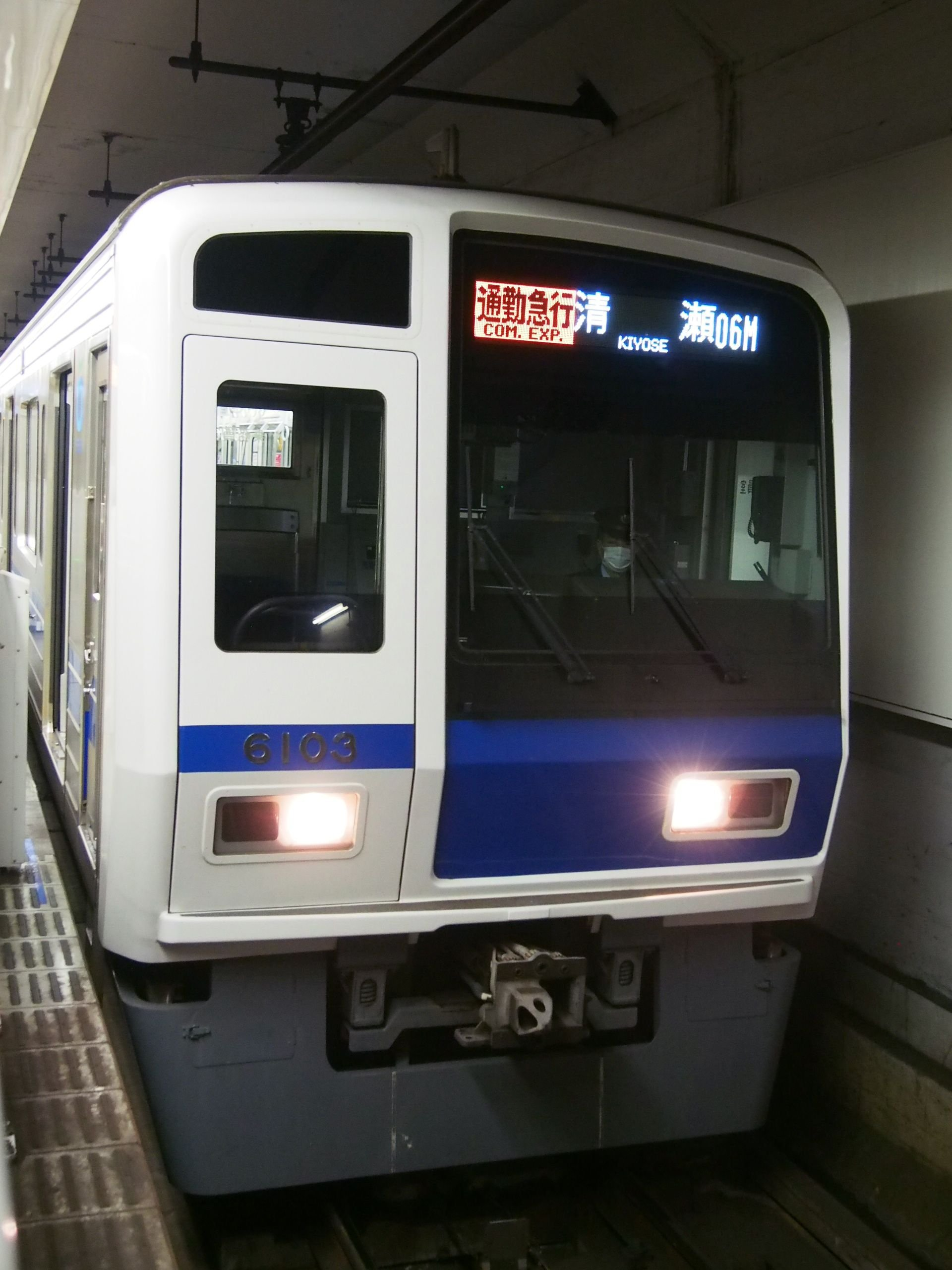 設定開始当初は西武6000系による通勤急行が和光市発着のみ設定されていたが、2016年3月28日より西武線直通にも設定された。